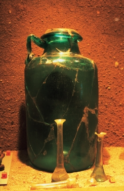 Santa Elena ermitako beirak (Irun)